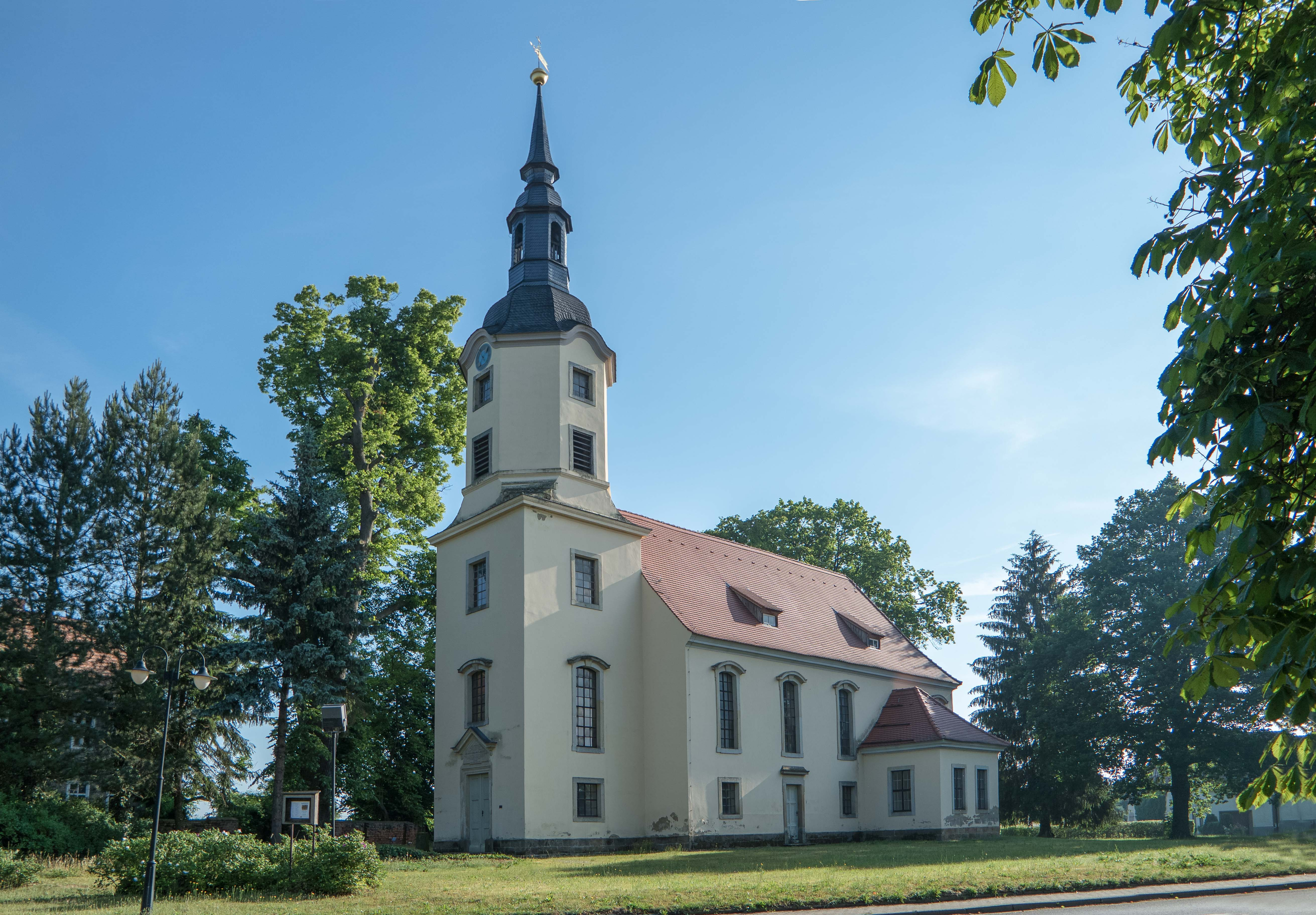 Kirche, Dorfstraße in Lebusa, Erbaut nach den Plänen des Architekten Pöppelmann